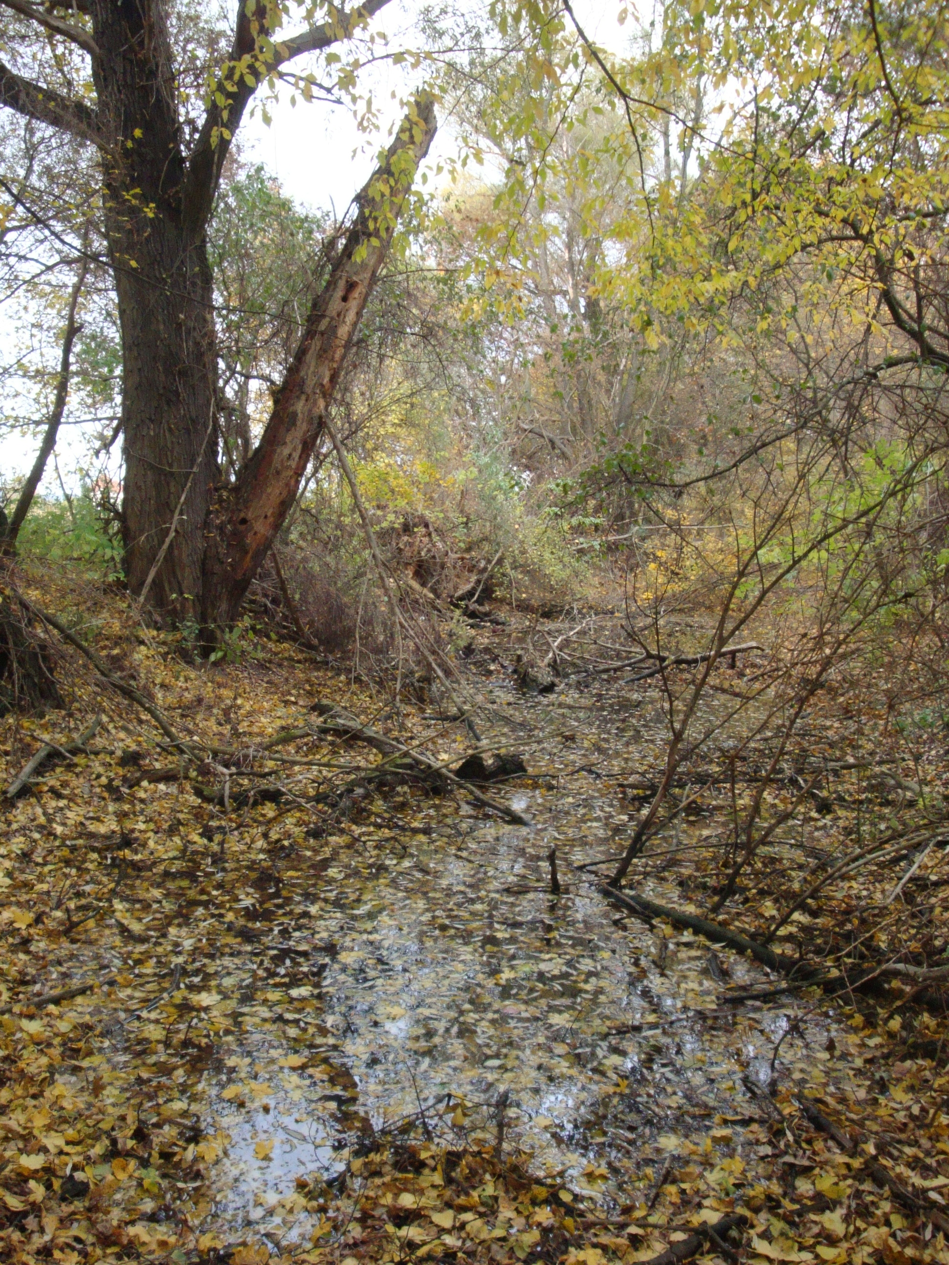 Rájecká tůň s pobřežním porostem, foceno v říjnu 2016